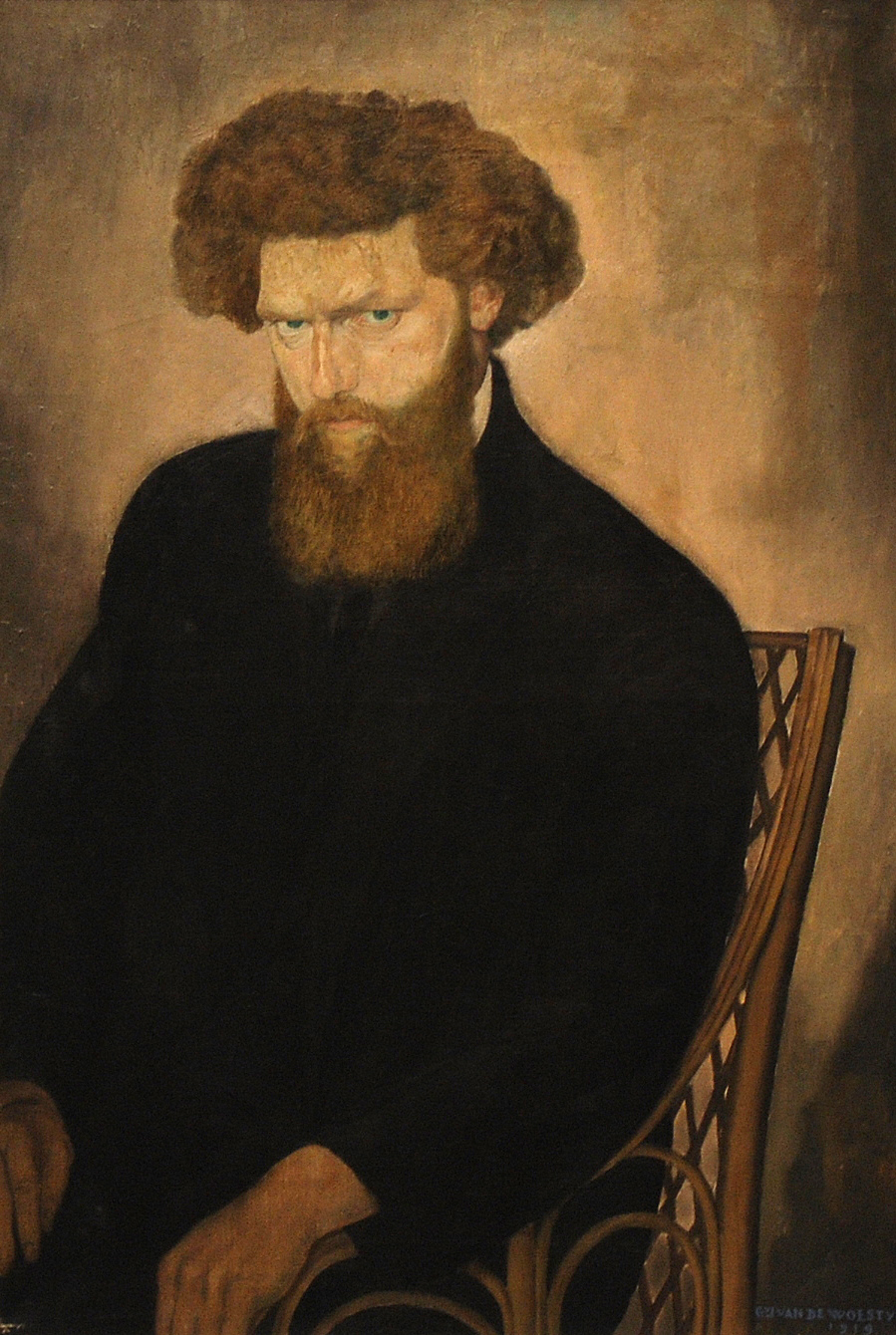 Gustave Van de Woestijne (1881-1947) - Portret van Fabrice Polderman - (1919) - MSK Gent